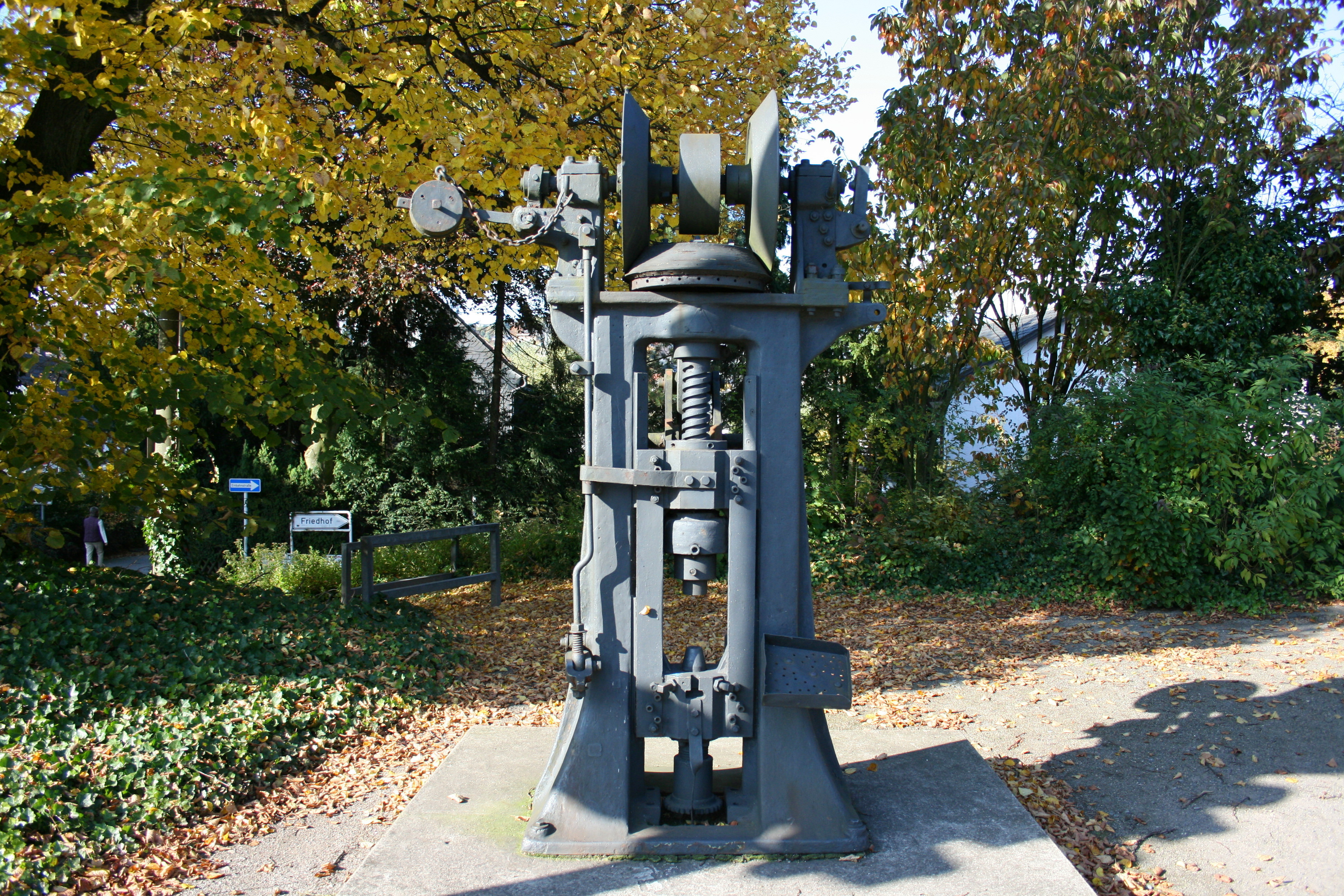 Historische Bolzenpresse an der Hagener Straße in Ennepetal-Voerde